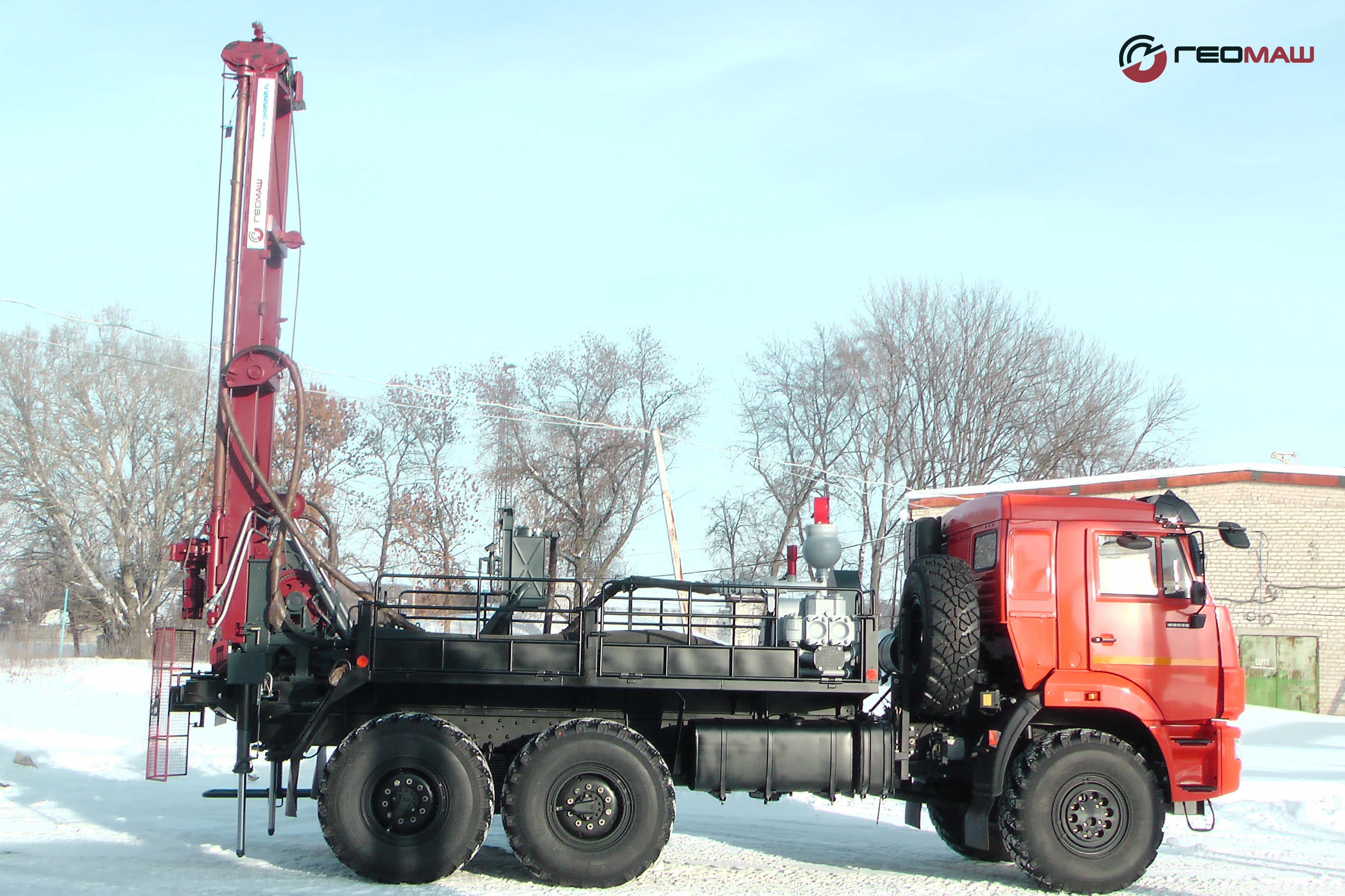 Буровая установка ПБУ-2 производства АО "Геомаш" (Курская обл., г. Щигры)